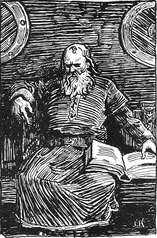 Portrett av Snorre Sturlasson